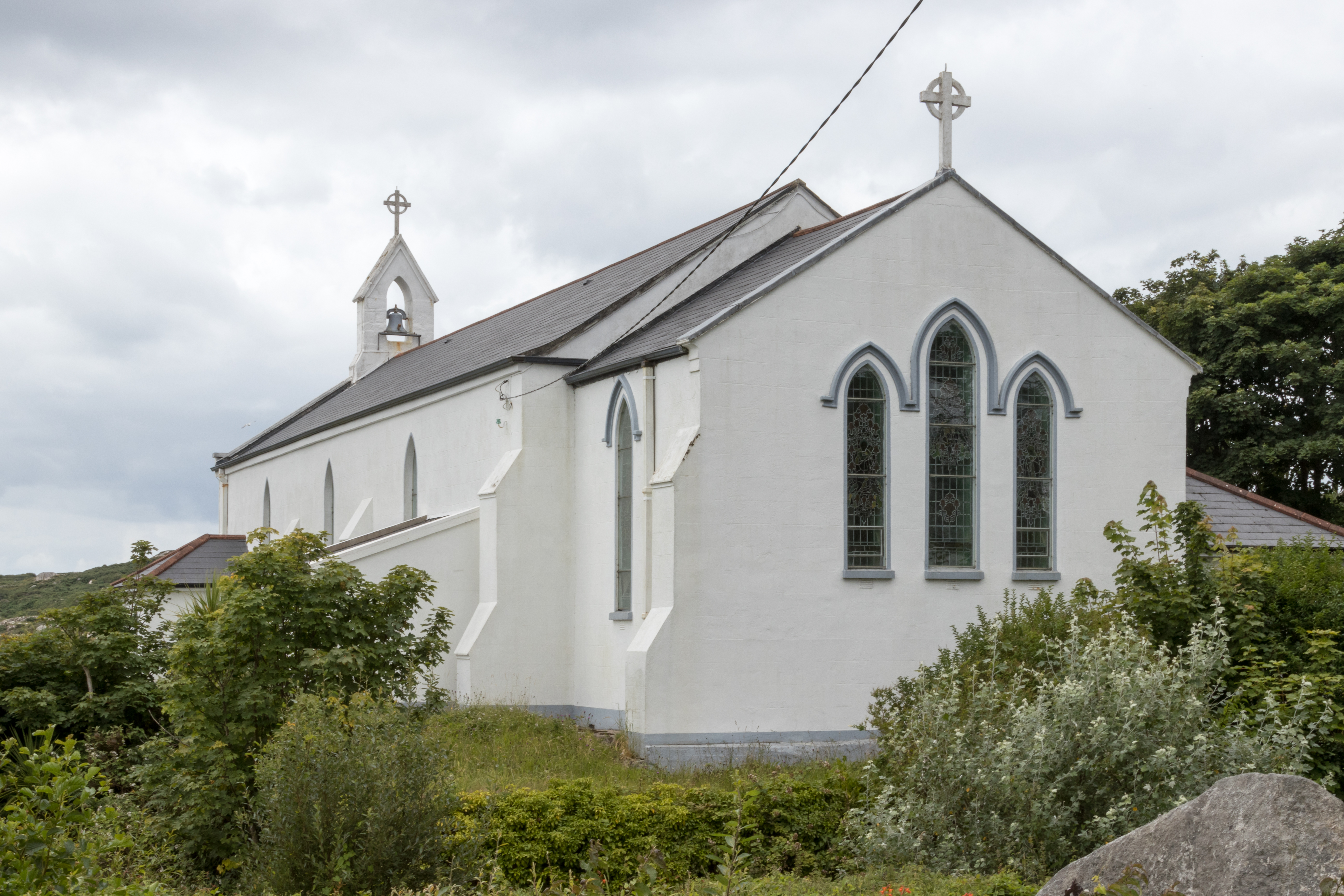 Kirche in Carna